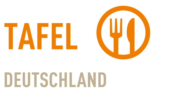 Logo des Tafel Deutschland e.V.